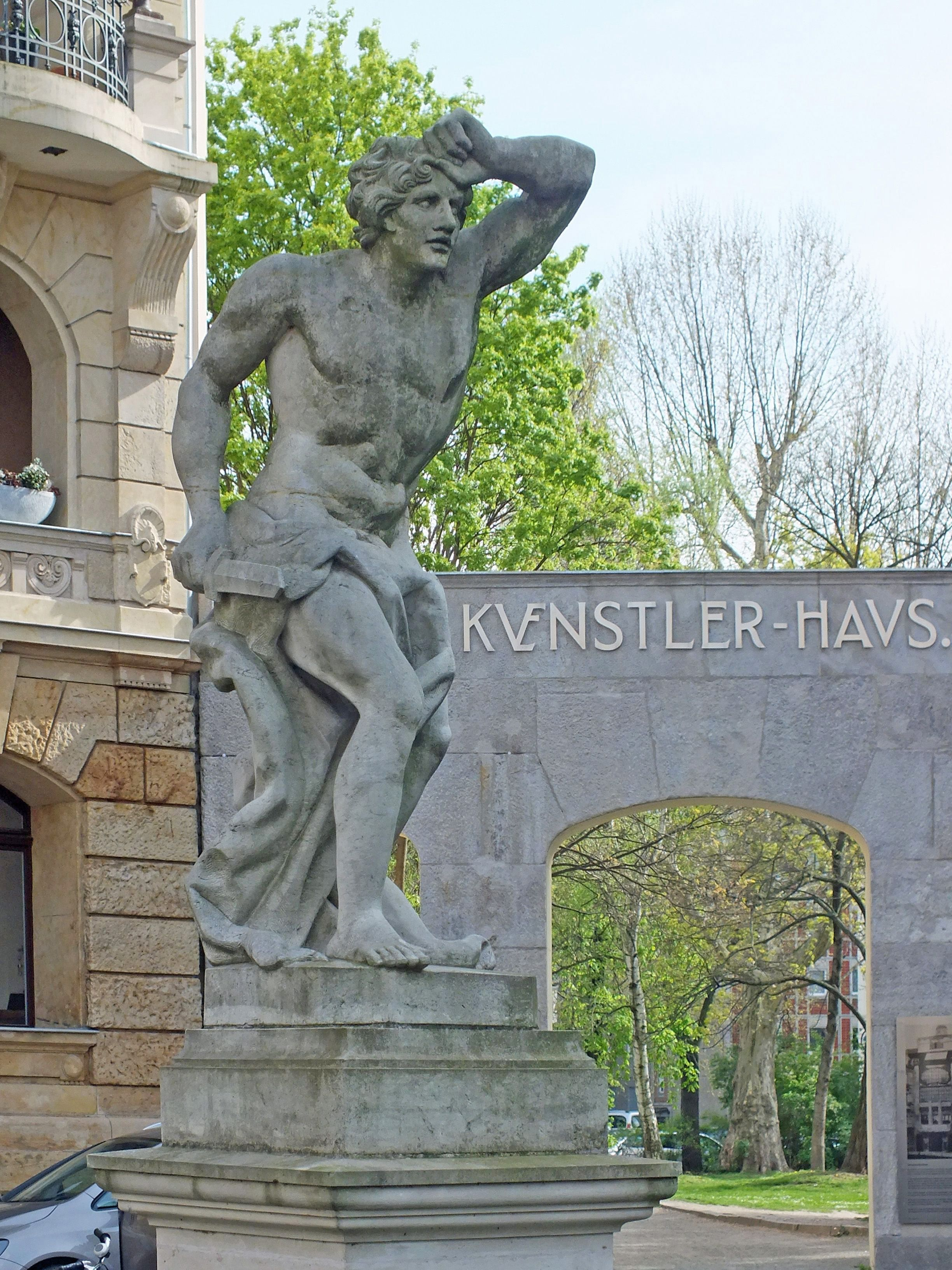 Südliche Schwertkämpferfigur auf dem Leipziger Nikischplatz. Neuanfertigung der Barockfigur durch Markus Gläser